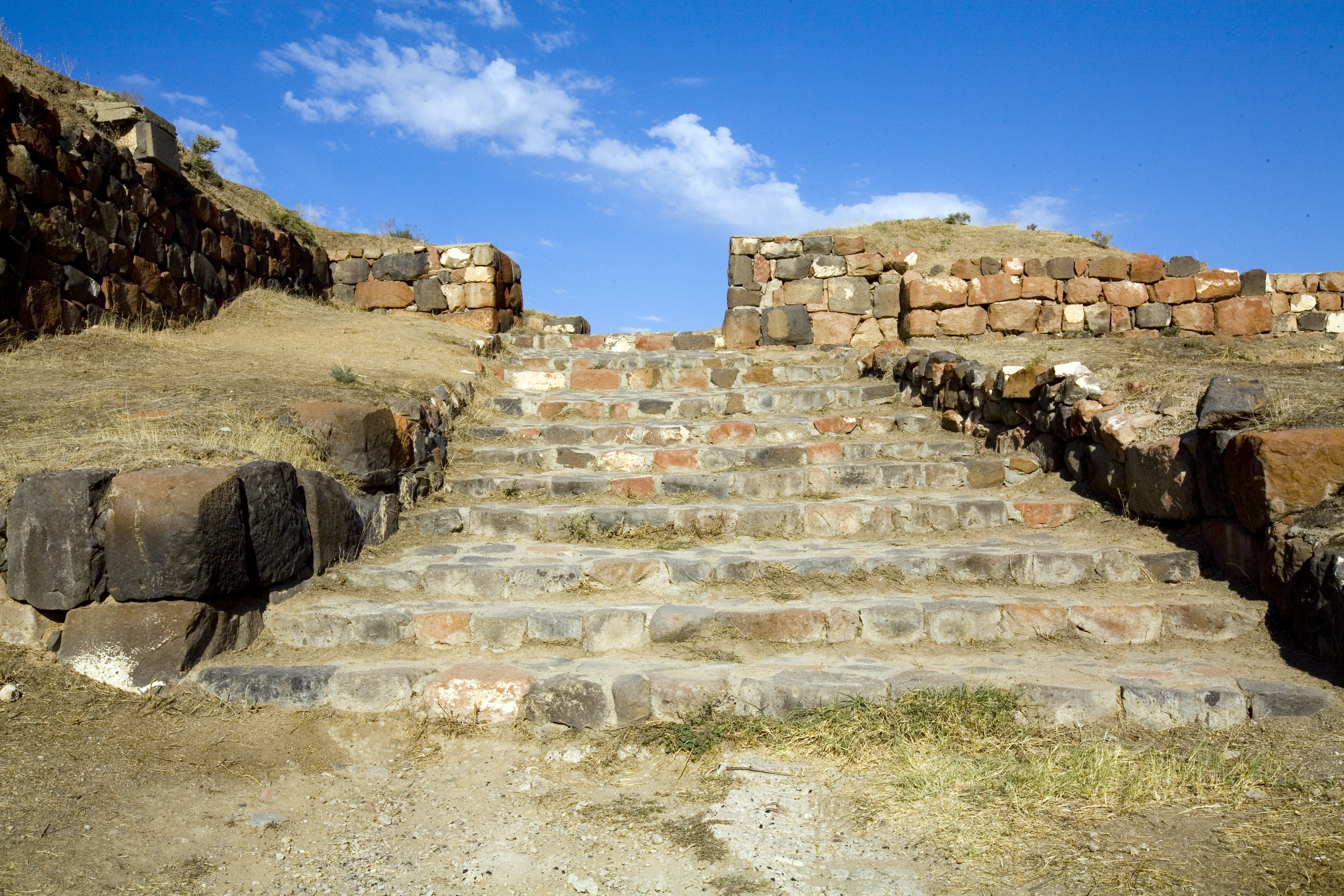 Erebuni, steps